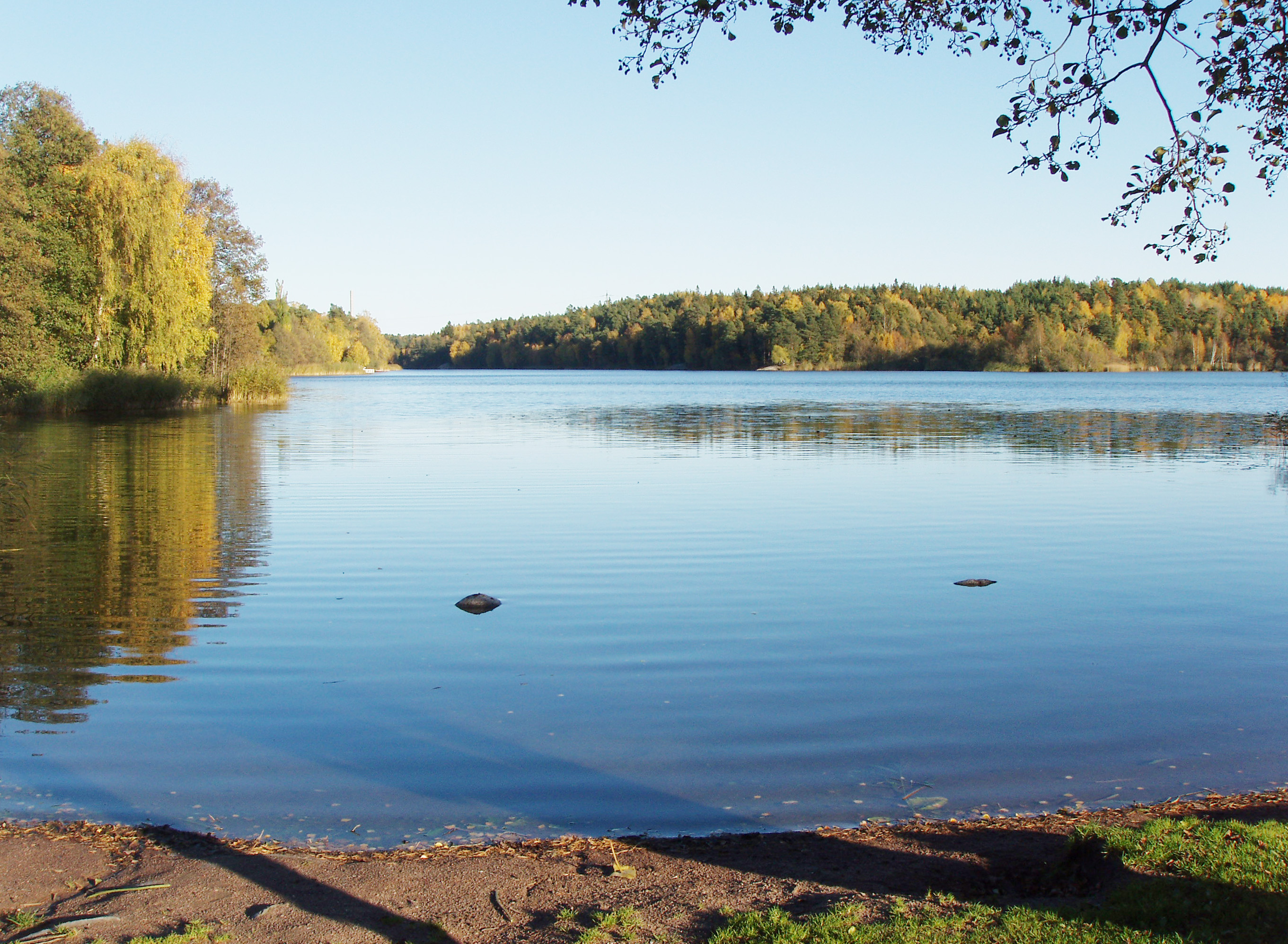 Kottlasjön med vy från den västra stranden österut.